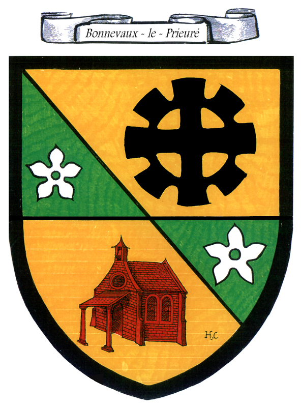 Blason de Bonnevaux-le-Prieuré